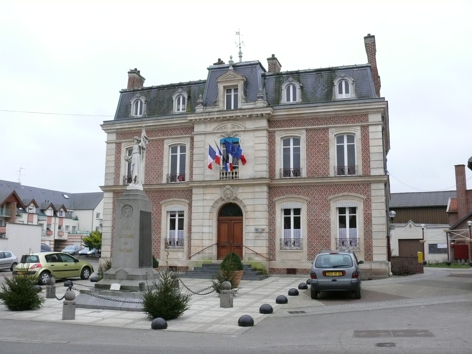 La Mairie de Conty